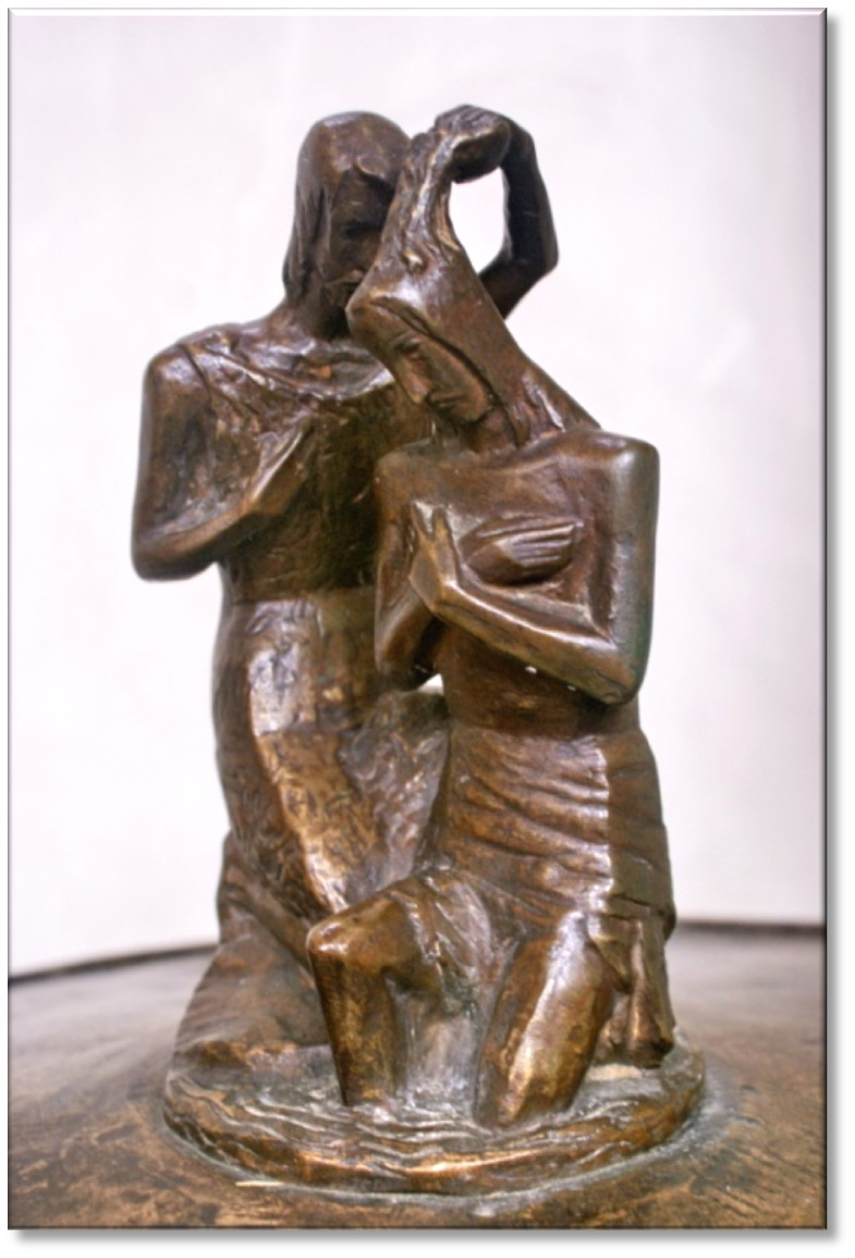 Bronze-Skulptur auf Taufbecken in der St. Nikolauskirche in Veringenstadt.